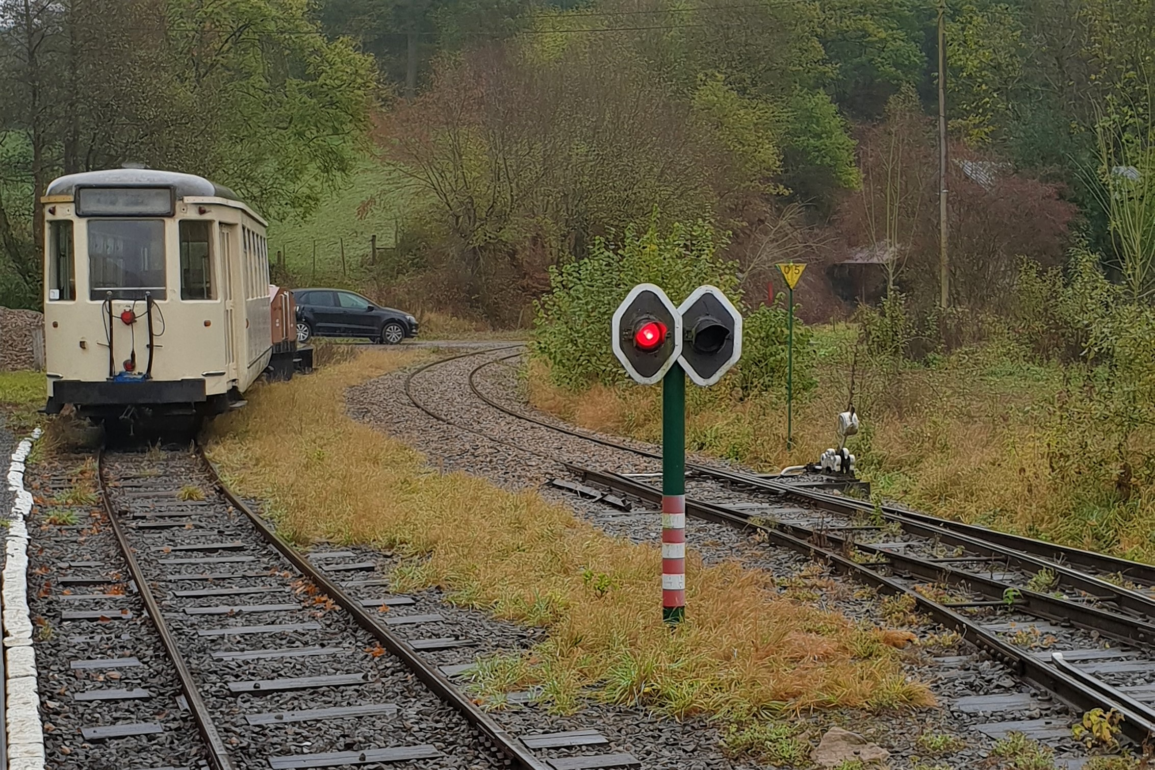 Een NMVB-sein bij de TTA